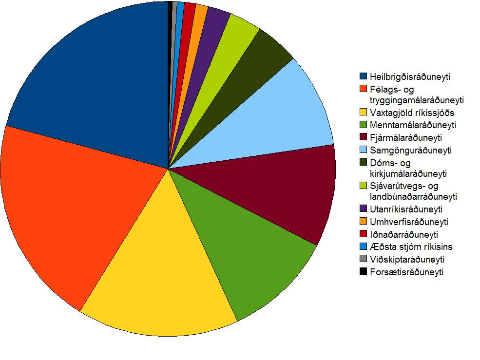 Fjárlög 2009